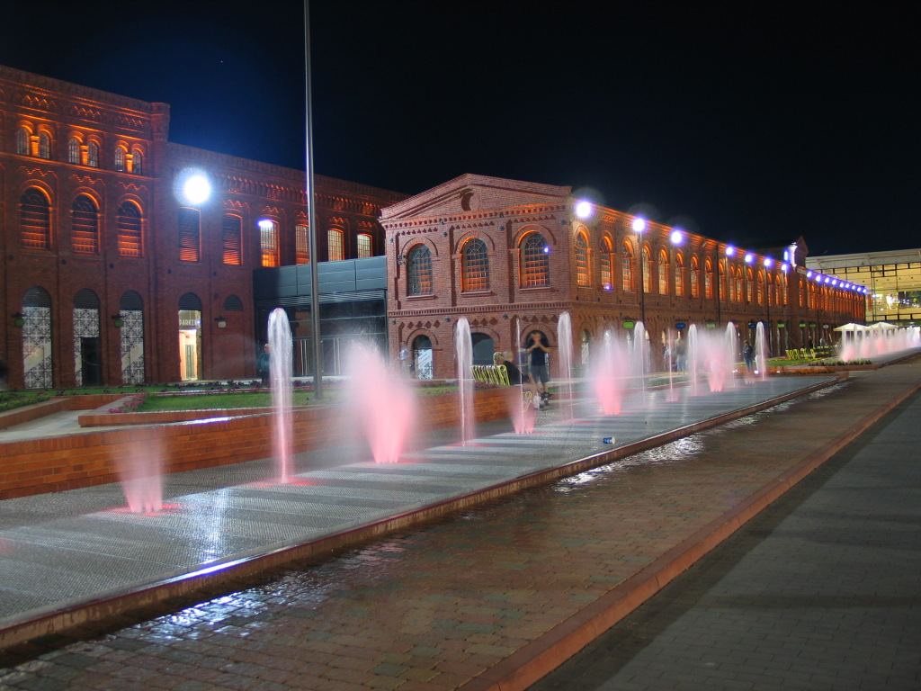 Centrum Manufaktura